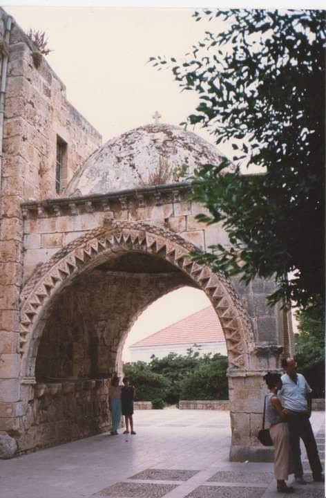 كنيسة مار يوحنا مرقس جبيل